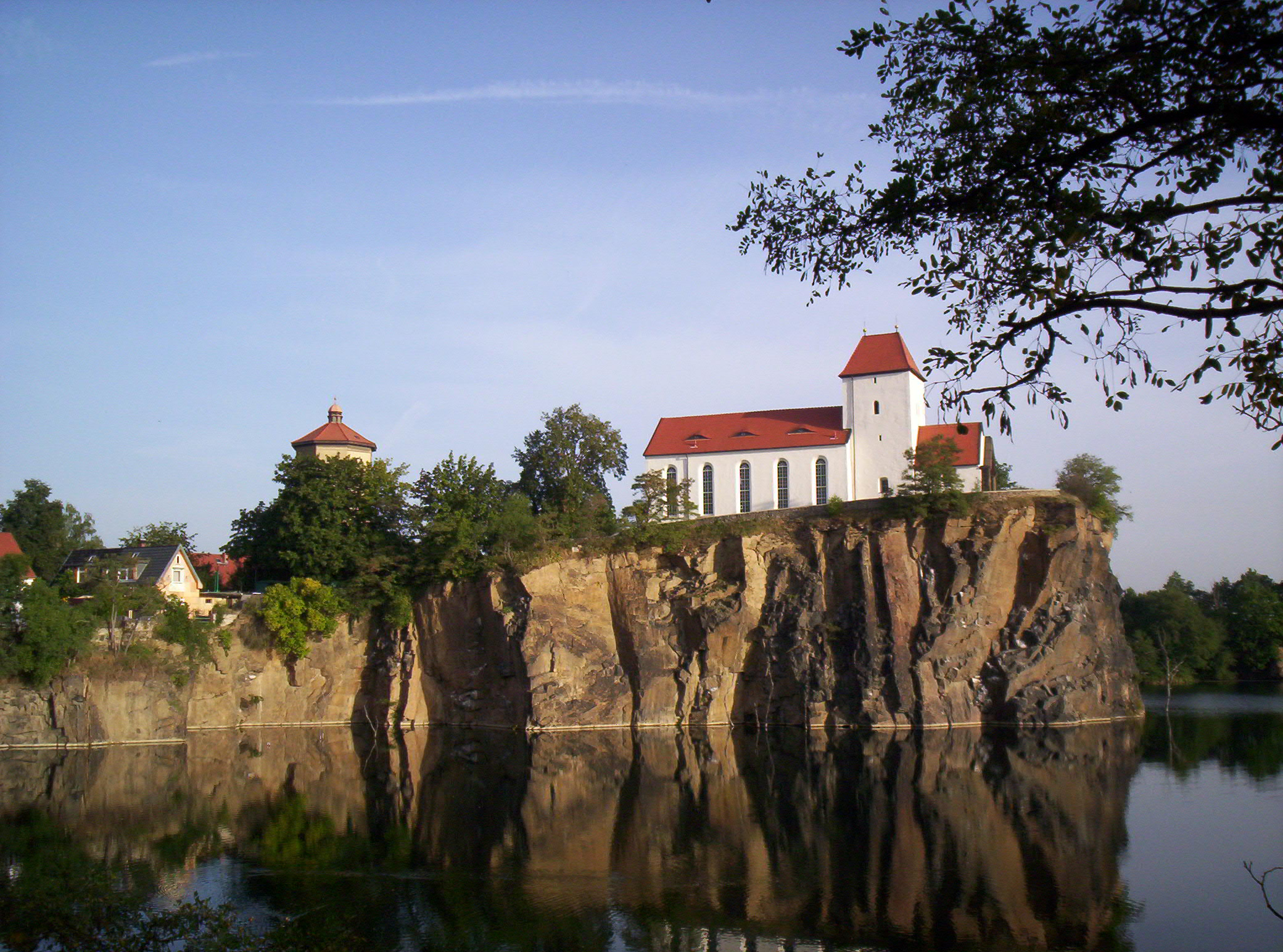 Der Kirchberg mit dem Wasserturm und der Bergkirche oberhalb des gefluteten Steinbruchs („Kirchbruch“) in Beucha, Brandis, Sachsen.